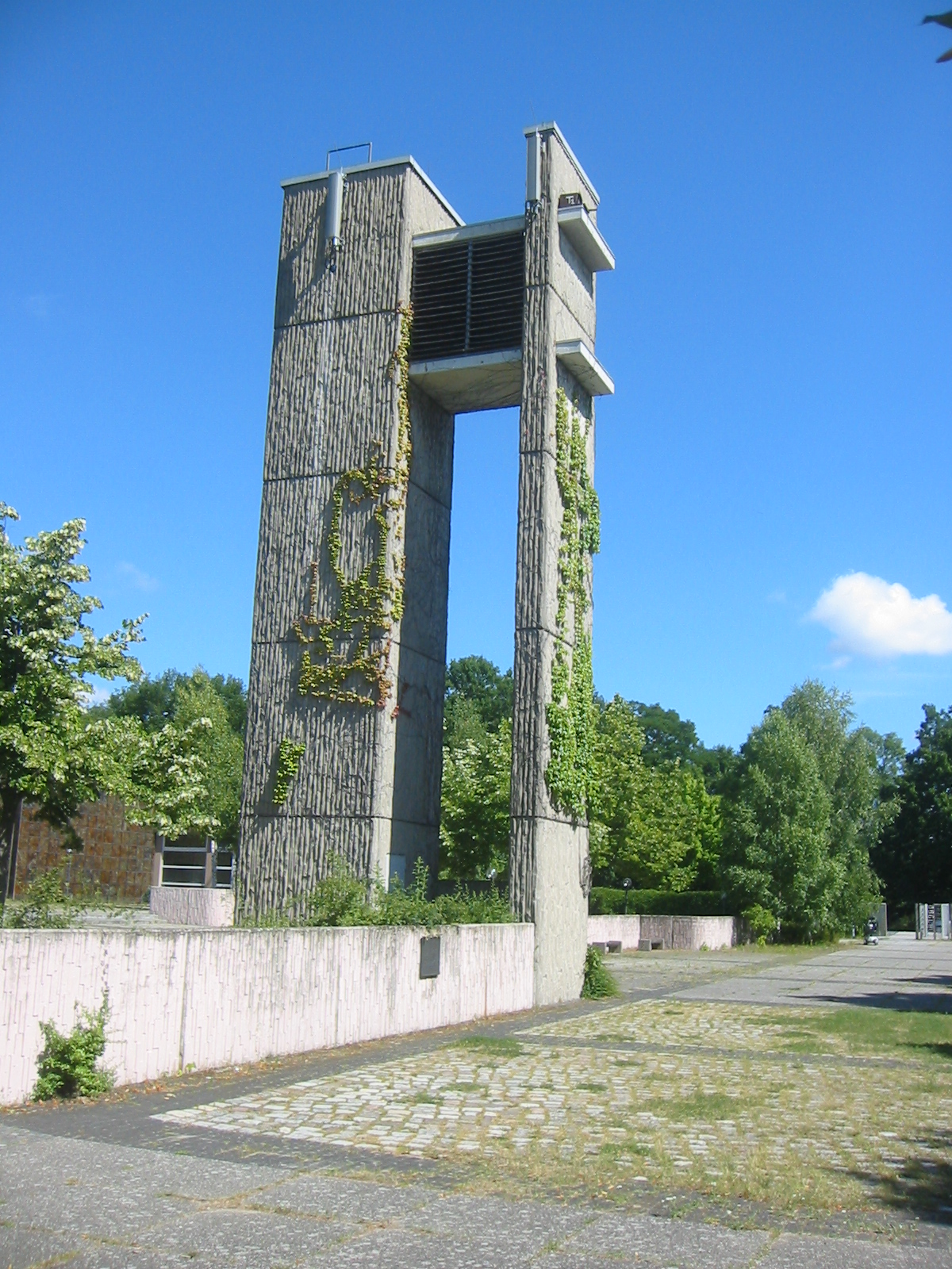 Glockenturm auf dem Landschaftsfriedhof Berlin-Gatow